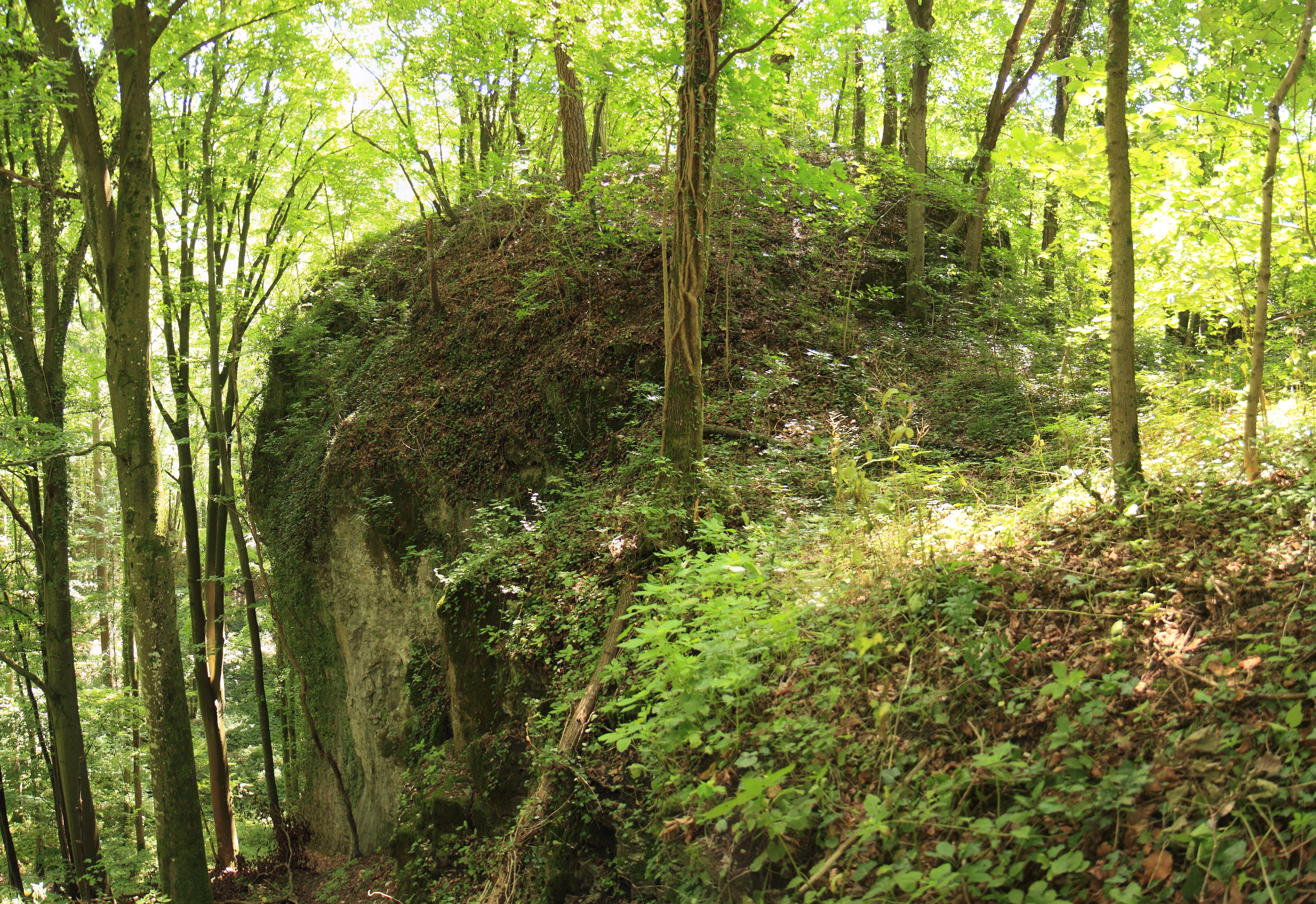 Burgstall Thüngfelderstein - Ansicht des Felsturmes